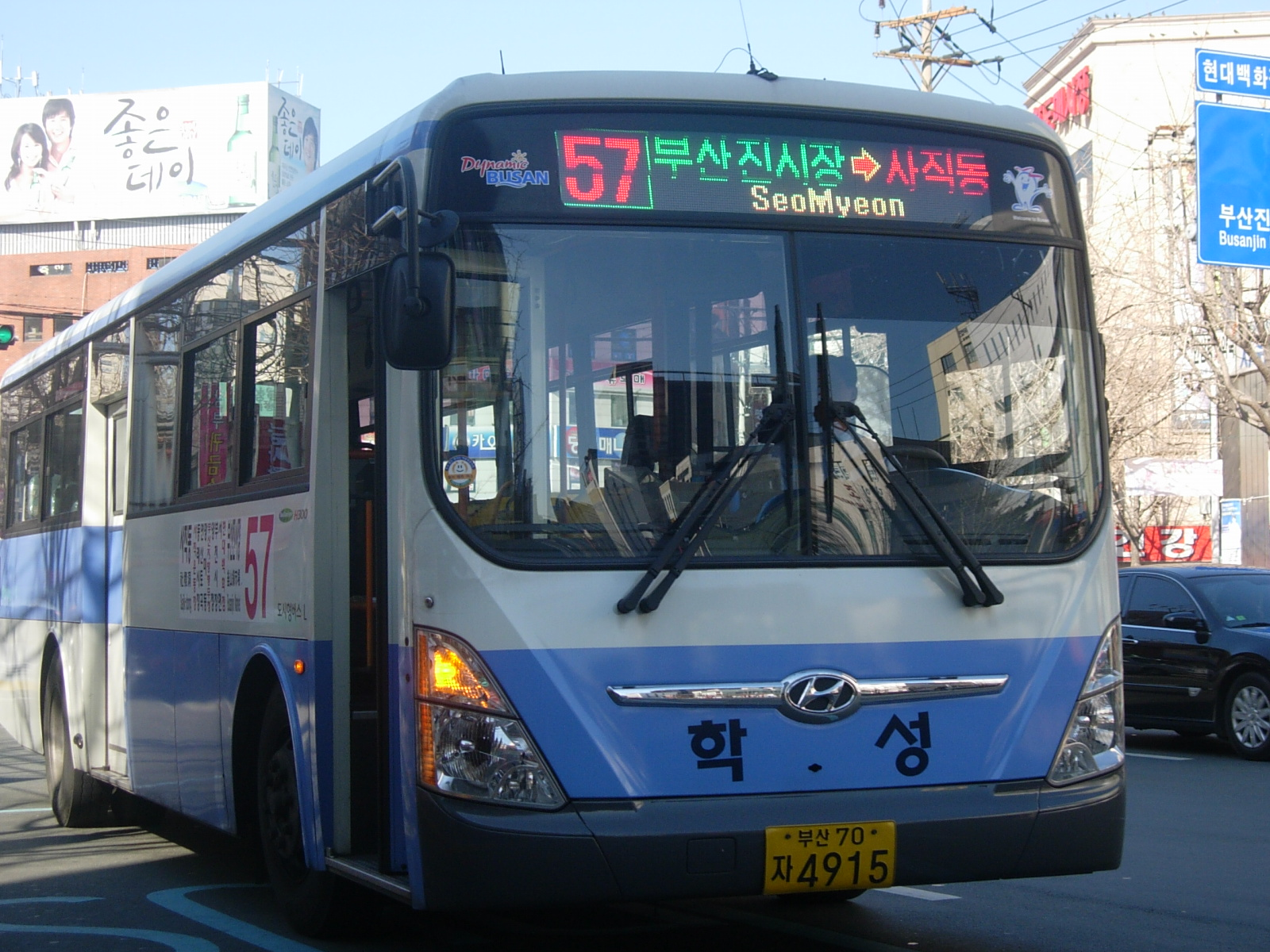 부산시내버스 57번 (장소: 자유시장)